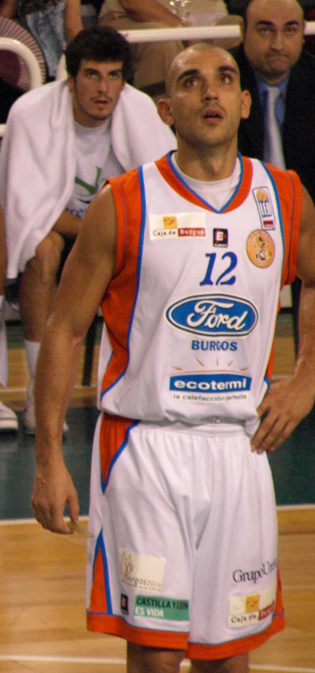 César Sanmartín con la camiseta del Autocid Ford Burgos